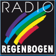 früheres Logo von Radio Regenbogen.